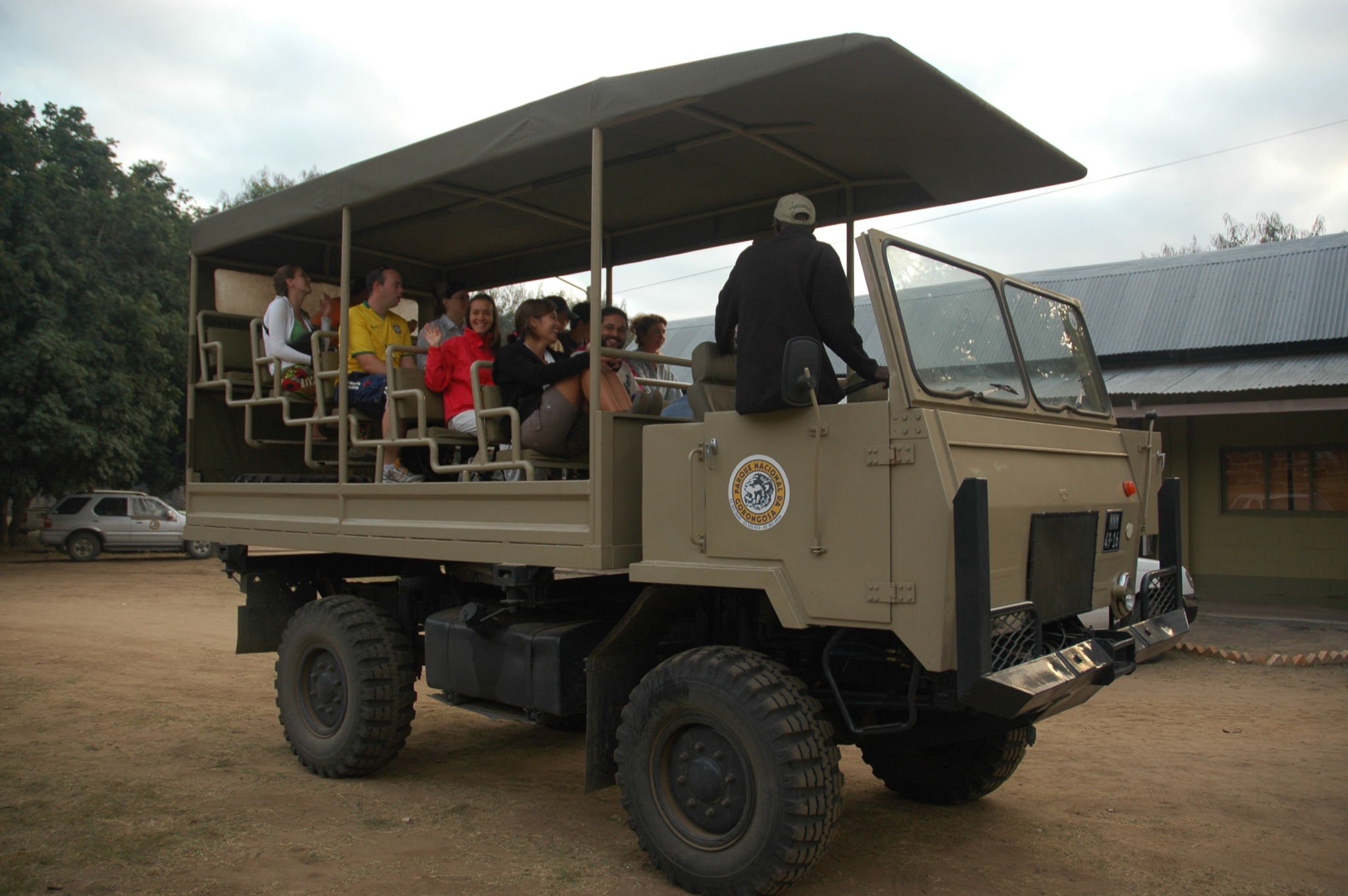 El camion del safari